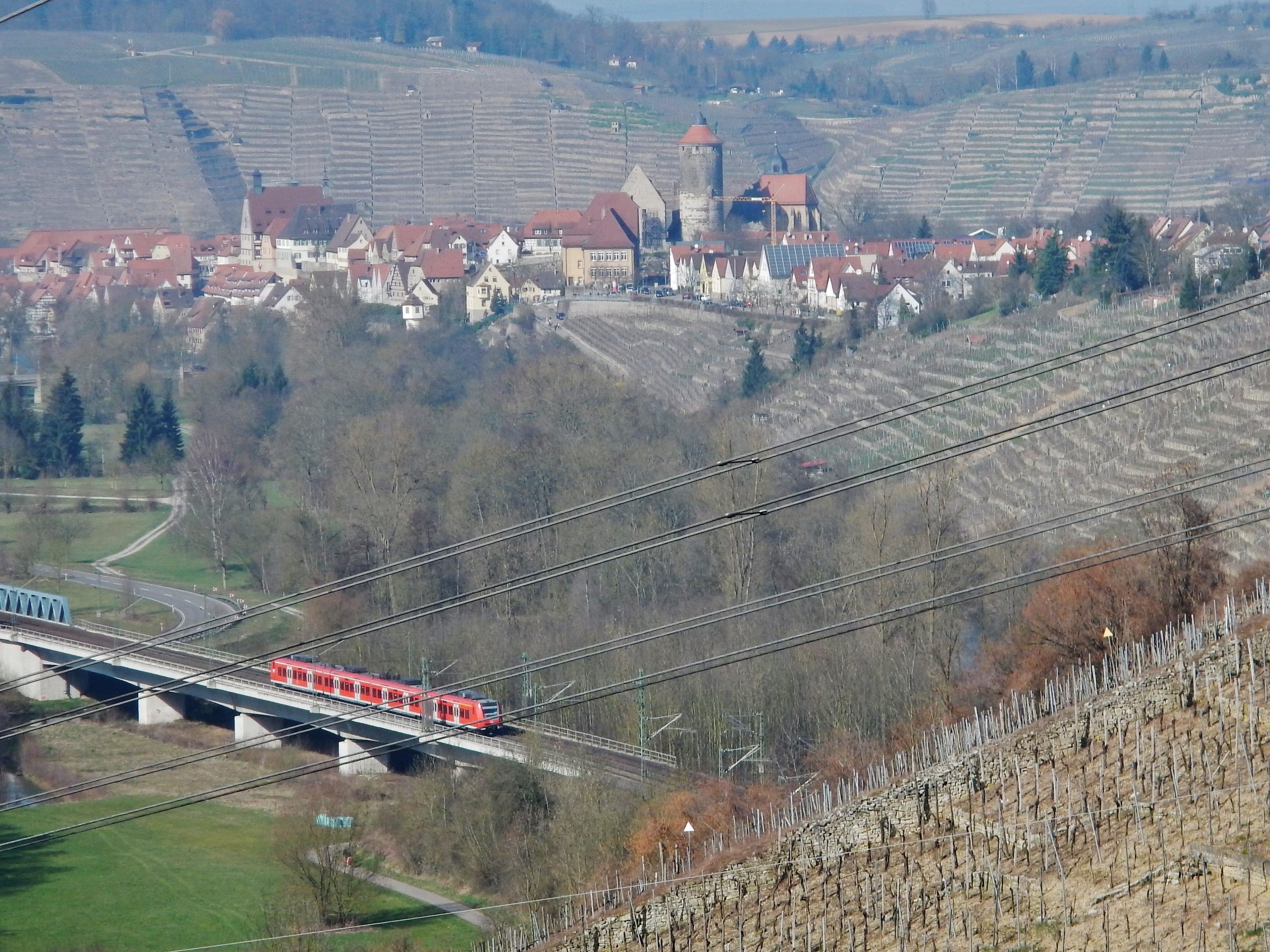 Blick nach Besigheim mit Weinbergen und der S-Bahn nach Stuttgart